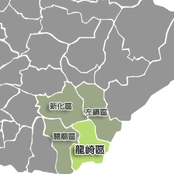 龍崎區相對位置